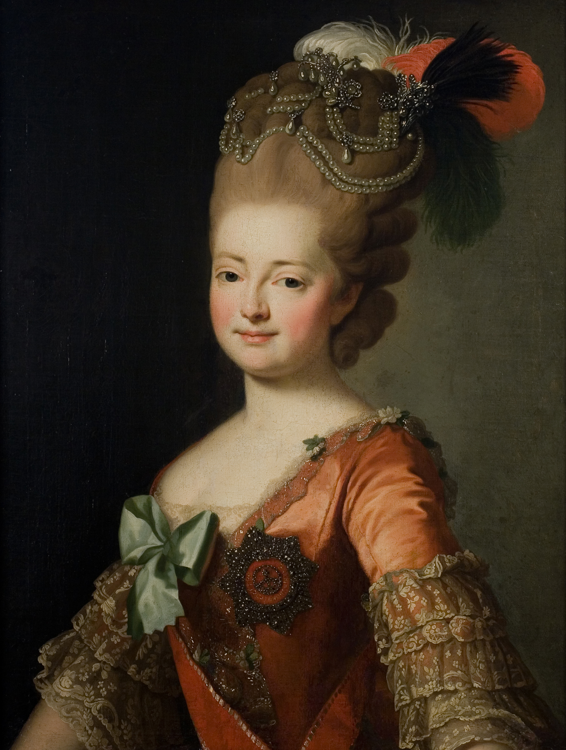 Мария Федоровна. Музей Тропинина